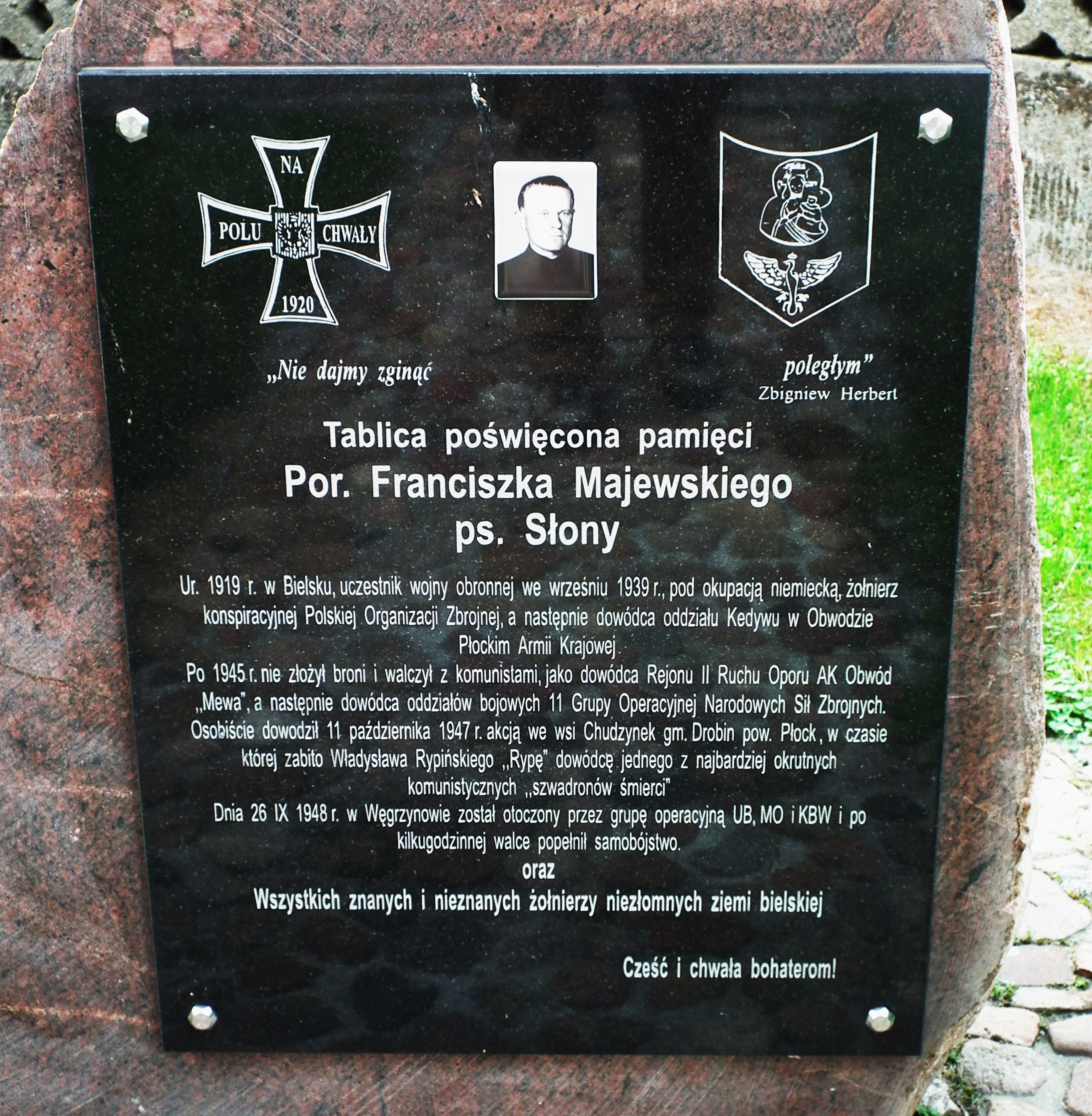 Bielsk - kościół par. pw. św. Jana Chrzciciela, 1910-1911.